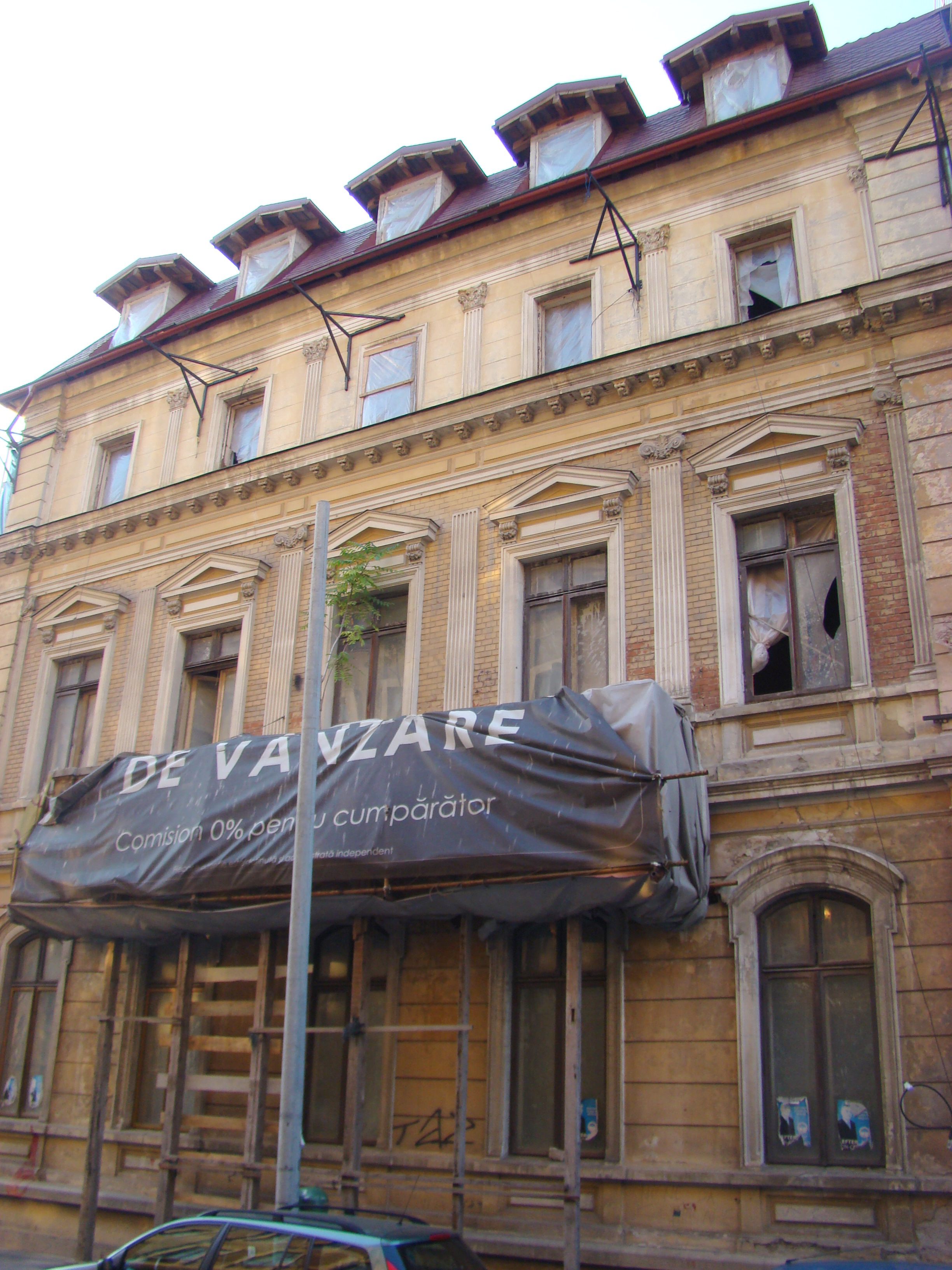 Casă monument istoric, str.Berthelot, nr.18